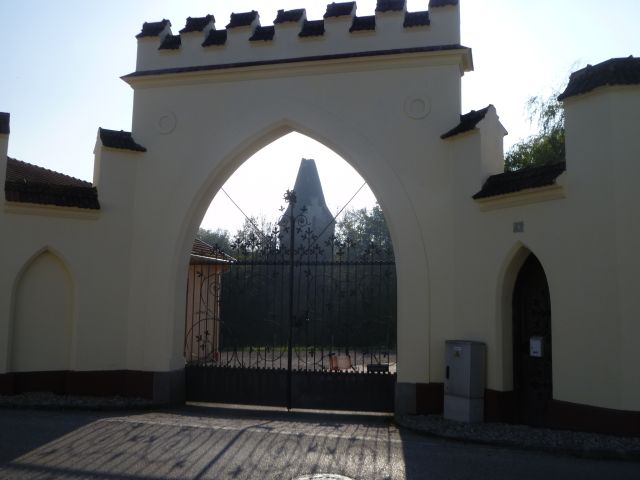 Schloss Inharting_Eingangstor